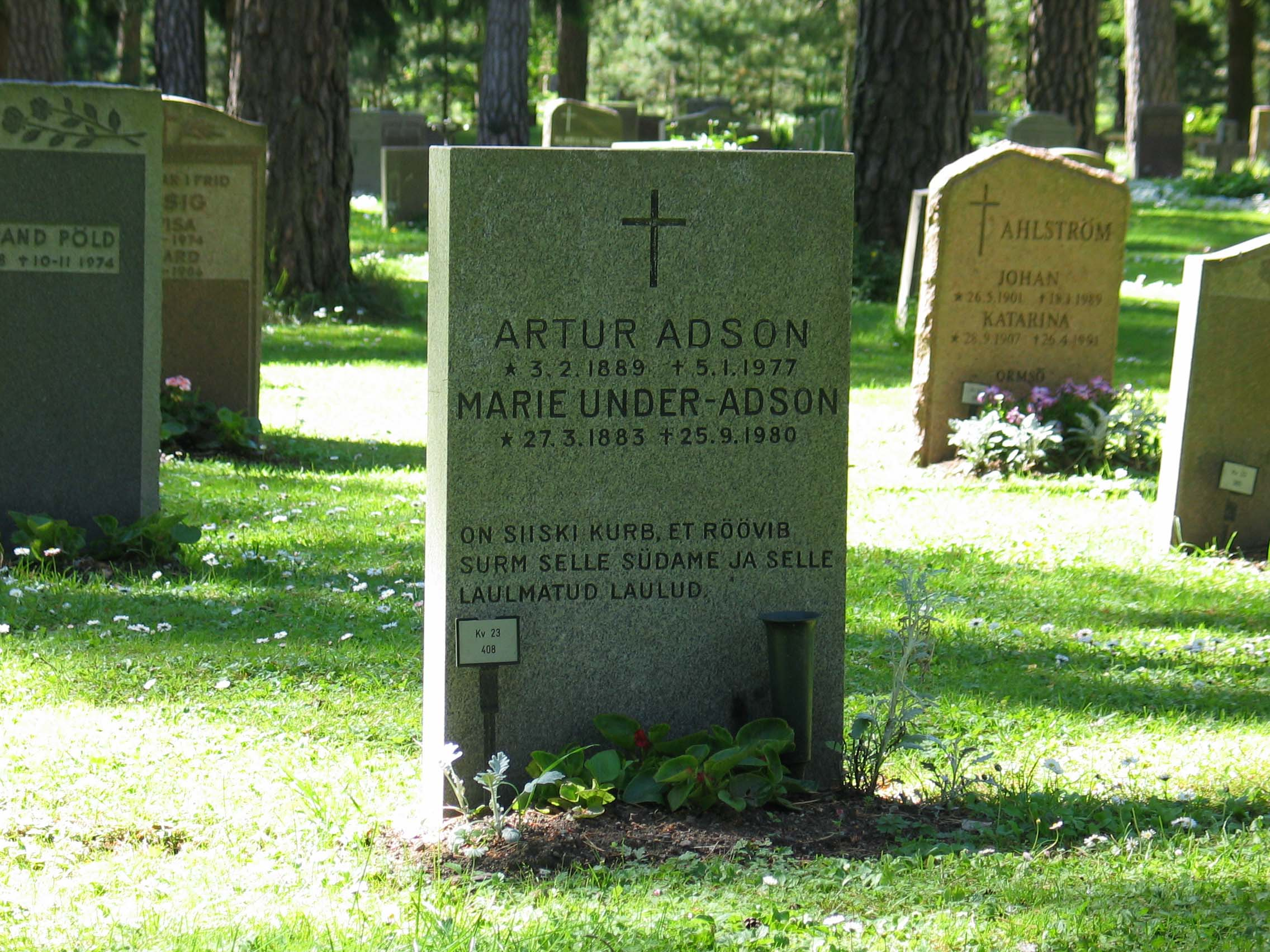 Marie Underi ja Artur Adsoni hauakivi 23. kvartalis